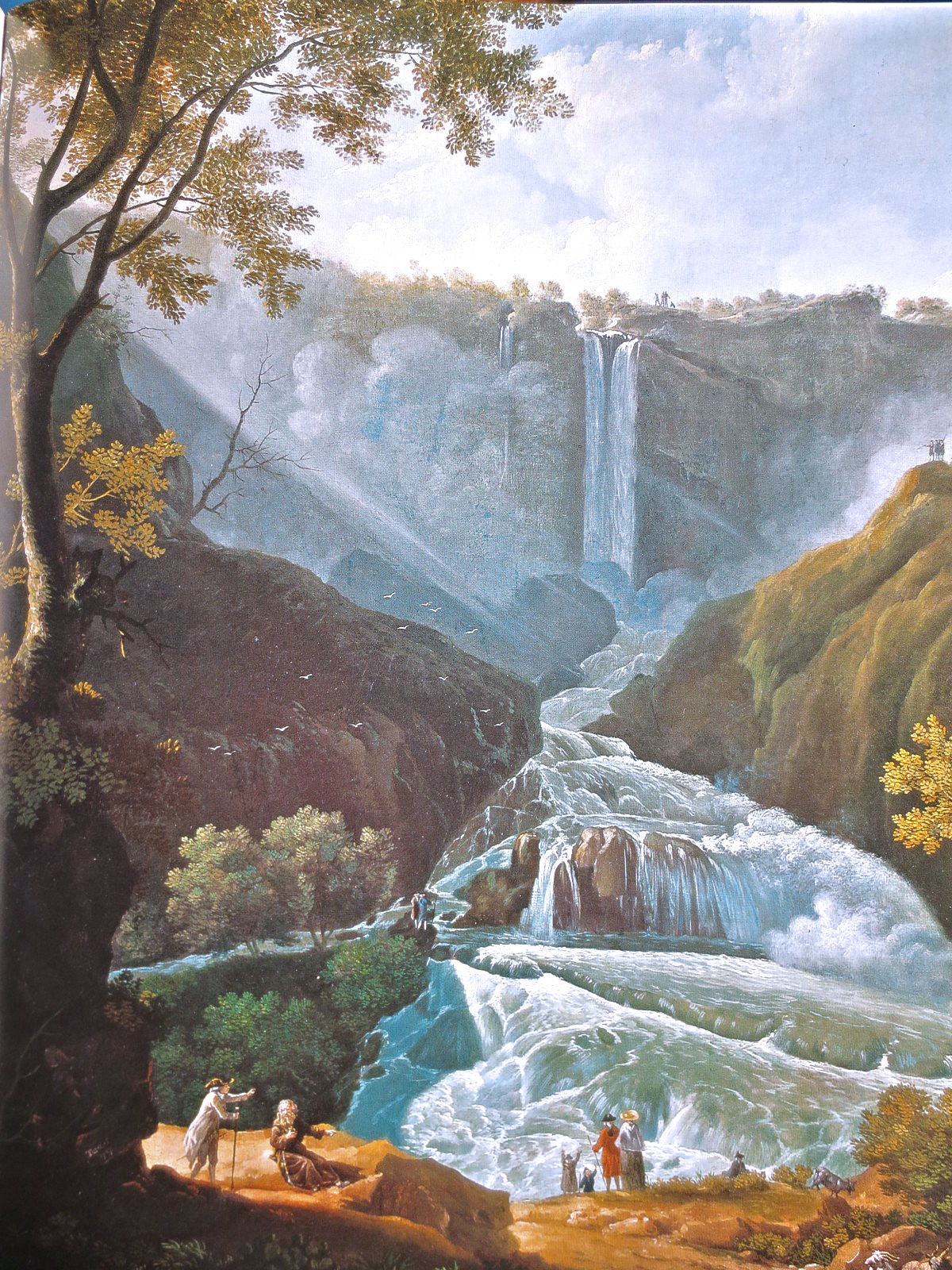 Cascata di Terni (Thomas Patch, 1745, Palazzo Montani, Terni)